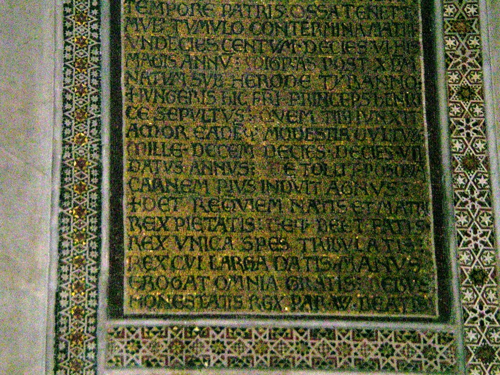 Memorialtafel für Heinrich, Bruder Wilhelms II. von Sizilien. Monreale. Palermo.